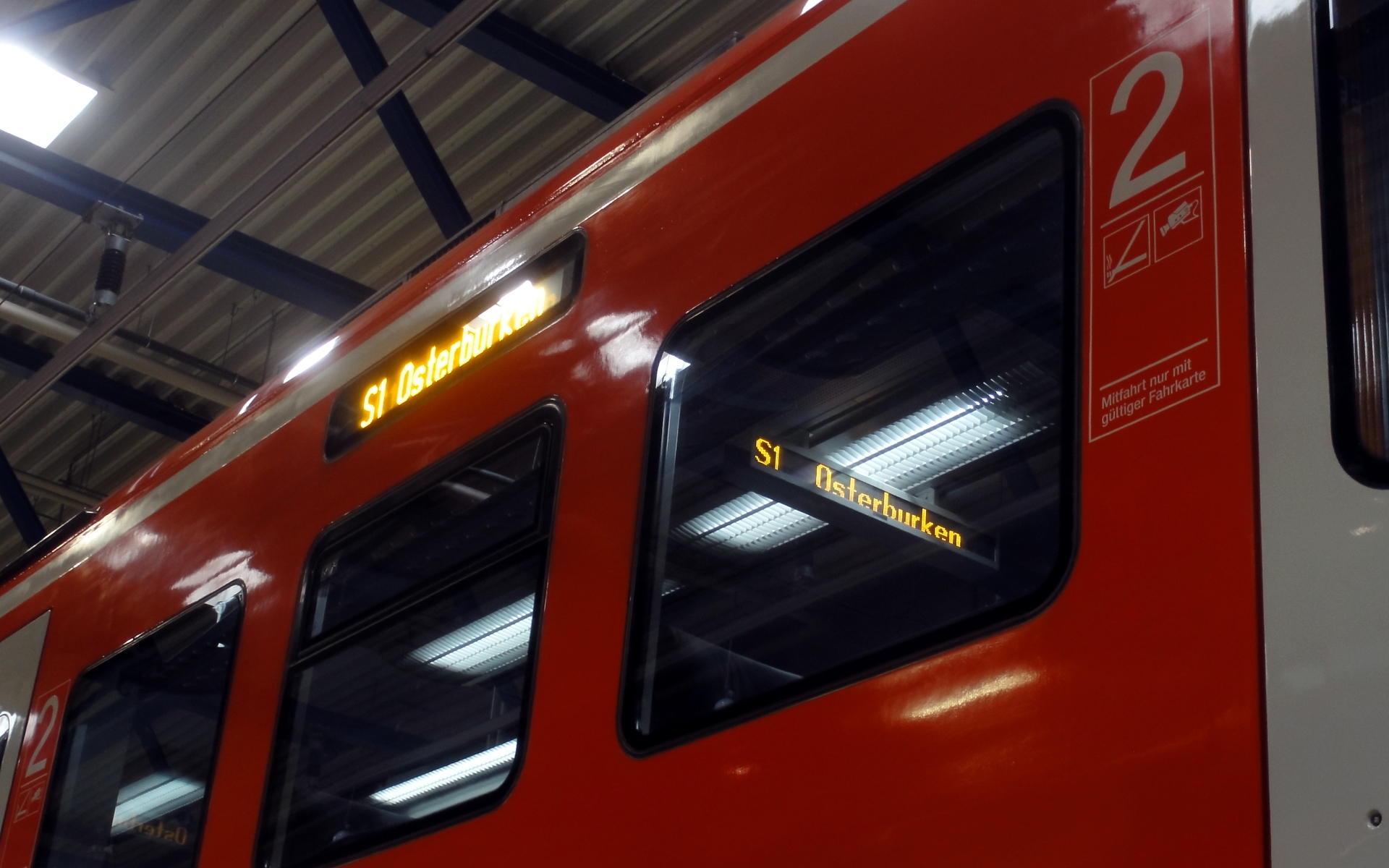 FIS-Anzeigen des 425 015 nach dem Redesign, von aussen betrachtet.